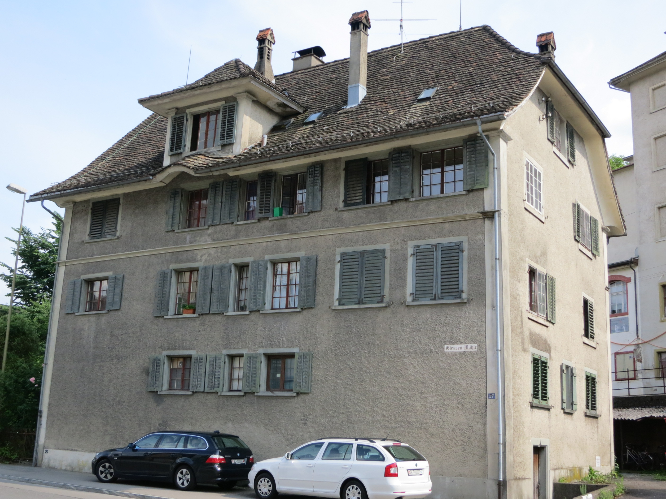 Mühle Giessen, Wädenswil ZH, Schweiz